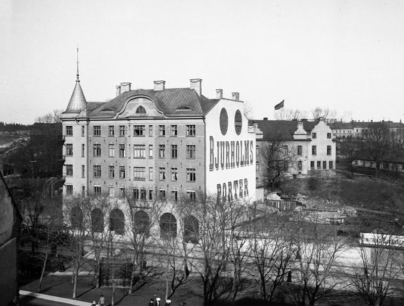 Skandalhuset vid Roslagstorg. Byggnaden uppfördes av Timmermansorden 1906 och revs redan 1925. Namnet kommer sig av de många turerna för att få bygglov. Nuvarande korsningen Birger Jarlsgatan och Runebergsgatan. Fotonummer F 3400